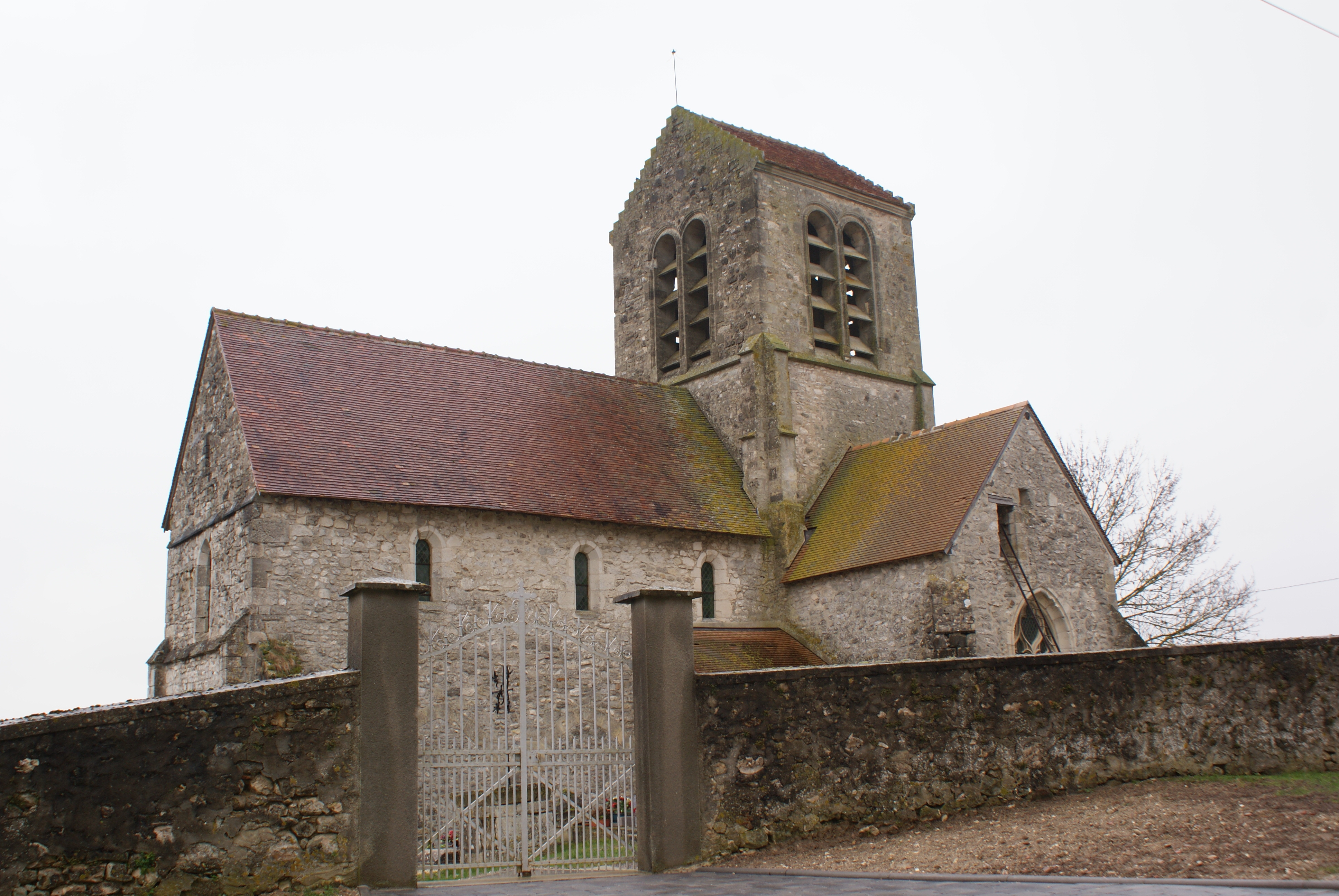 EGLISE d'ANTHENAY